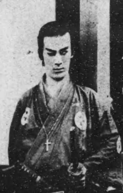 明石潮 『栄光の剣』（1924、東宝キネマ等持院撮影所）天草四郎を主人公とした映画作品